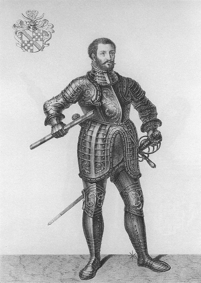 Markgraf Philibert von Baden-Baden (1536-1569) Dieses Bild wurde von seinem Urheber zur uneingeschränkten Nutzung freigegeben oder erreicht nicht die nötige Schöpfungshöhe, um geschützt zu sein. Das Bild ist damit gemeinfrei („public domain“). Uneingeschränkte Nutzung bedeutet, dass das Bild beliebig, auch ohne Namensnennung, verbreitet, kommerziell genutzt und verändert werden darf, in dem Umfang, der in der jeweiligen nationalen Rechtsordnung möglich ist.